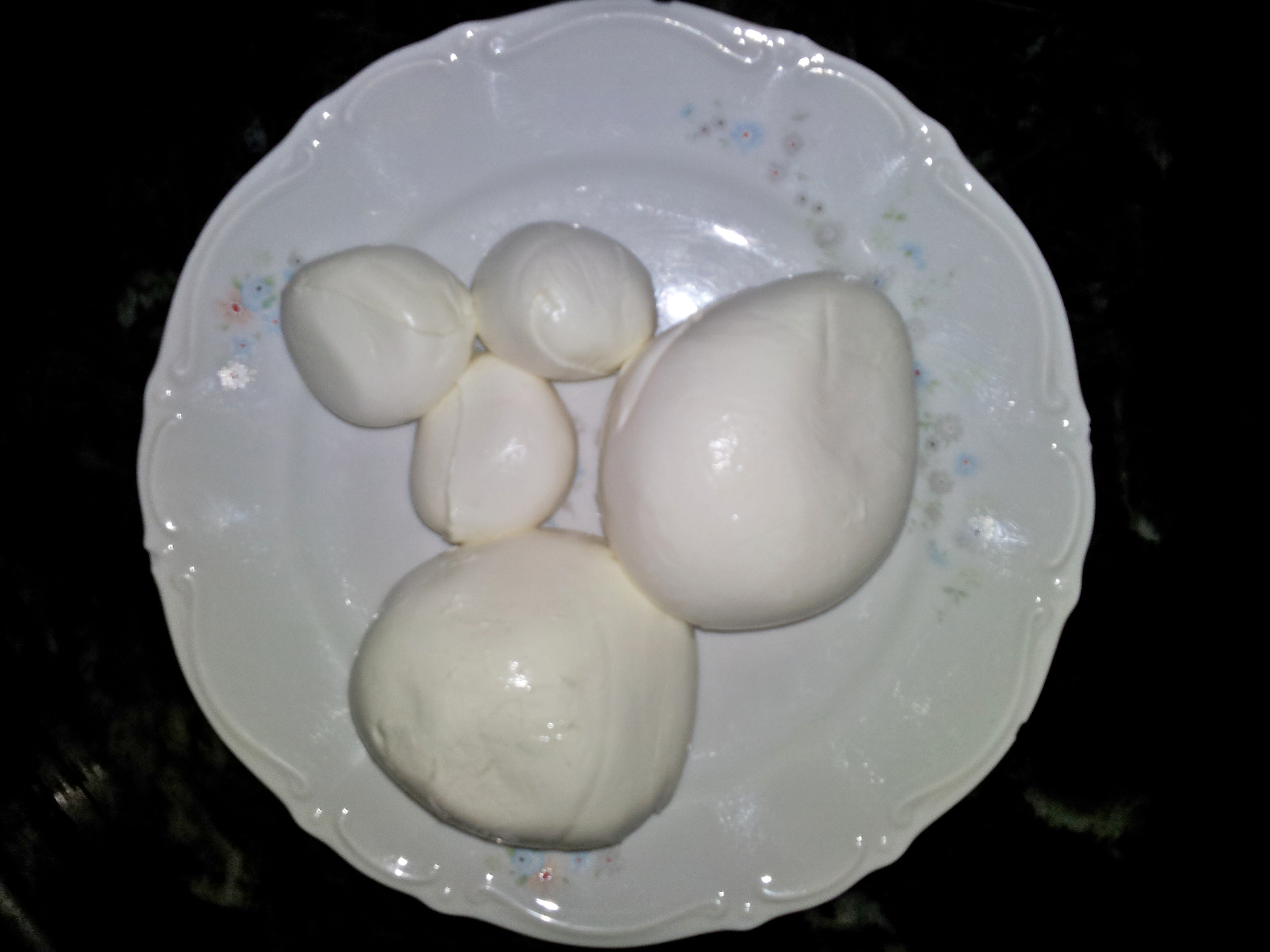 Mozzarella di Bufala Campana DOP (Aversa)